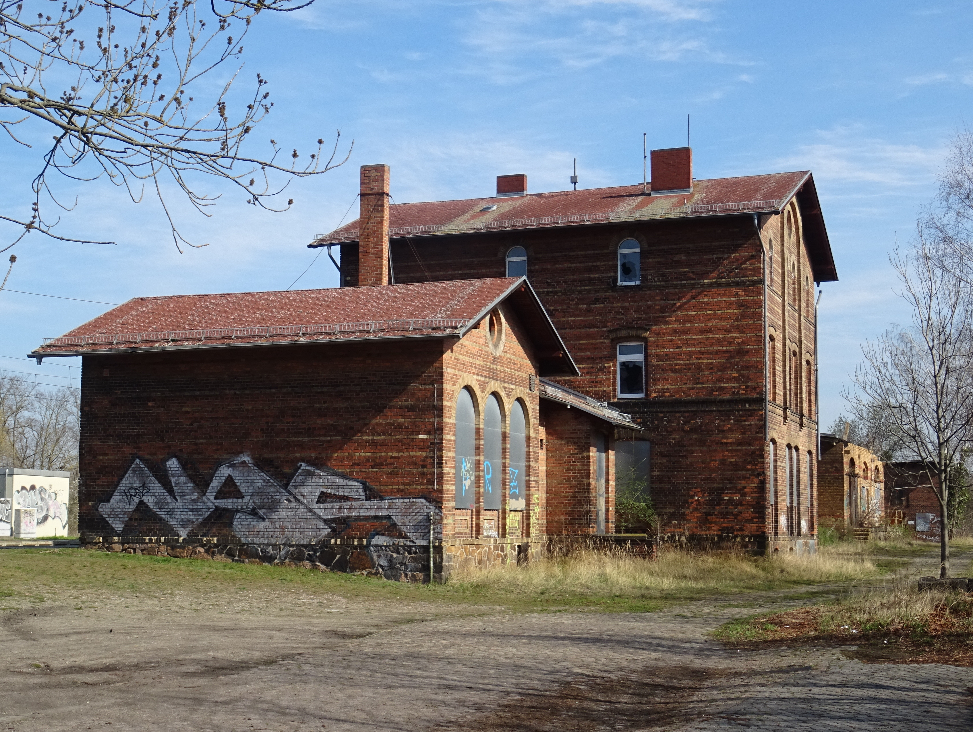 Bahnhof Bergwitz. Denkmalgeschütztes Empfangsgebäude, Straßenseite.